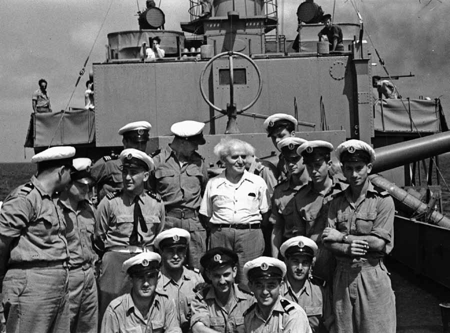 דוד בן גוריון מבקר בחיל הים על סיפון אח"י אילת א-16